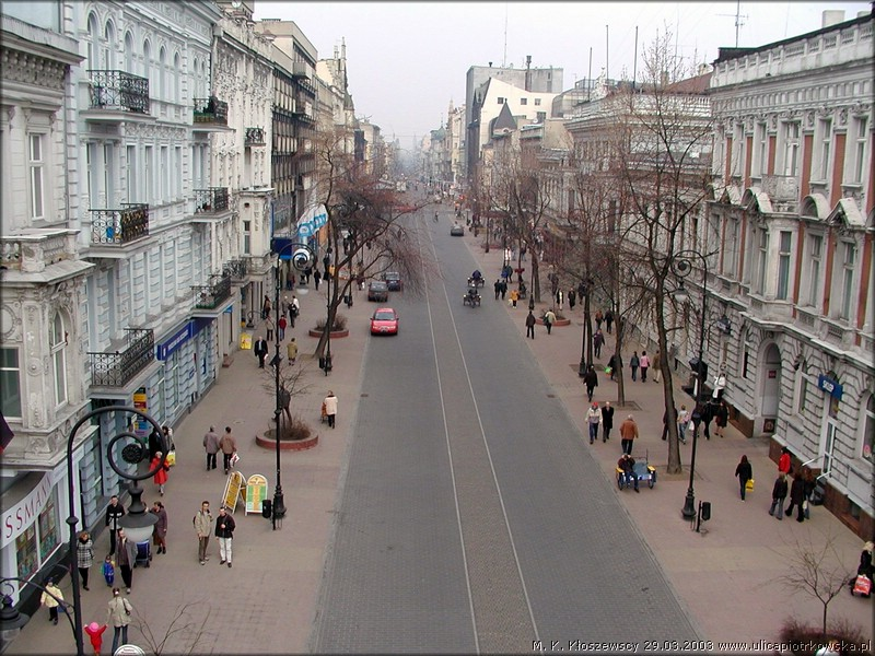 Lodz - ul. Piotrkowska